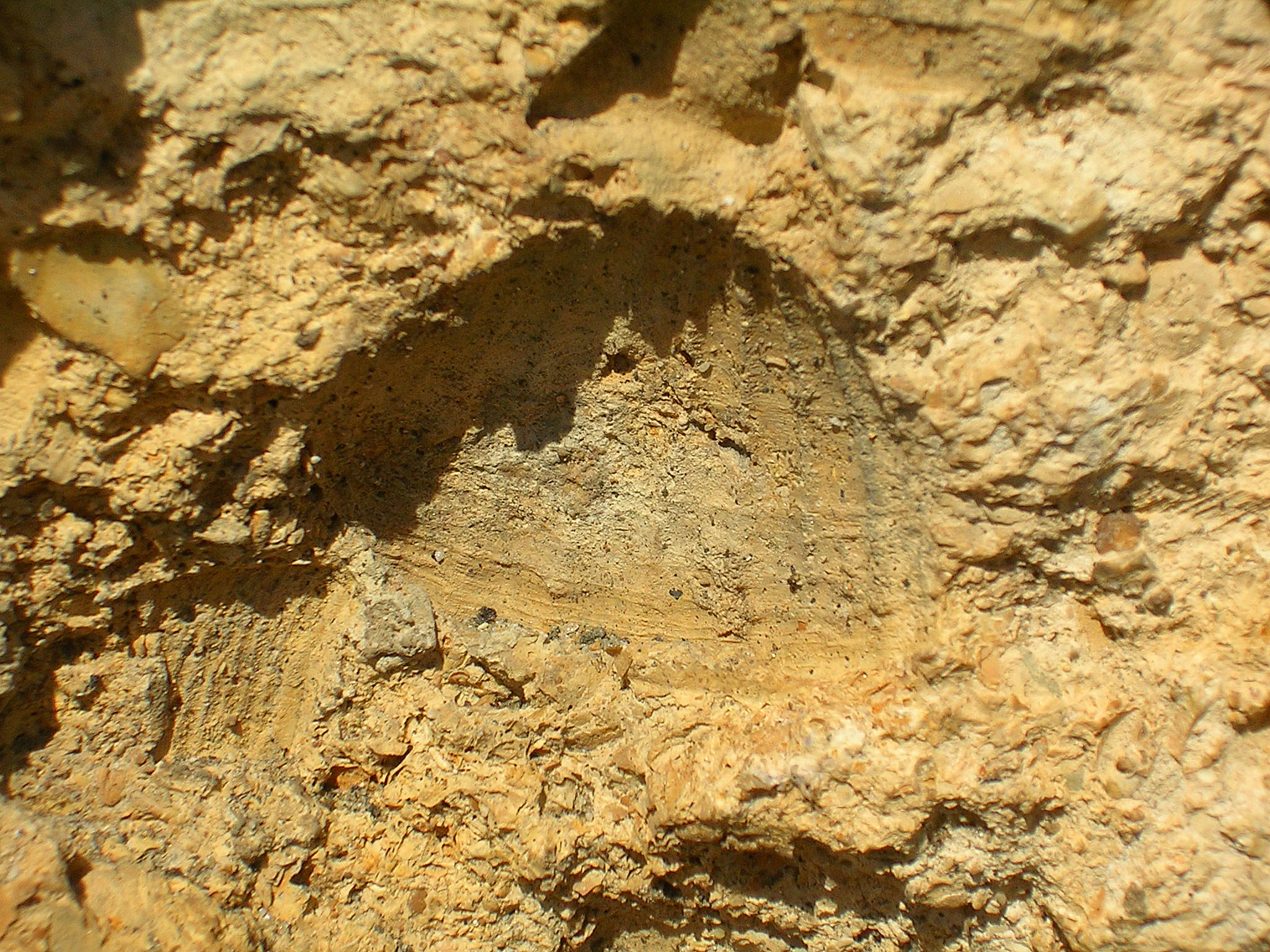 Coquillage fossilisé incrusté dans pierre coquillère, Landes Photo prise par Jibi44 en juillet 2006